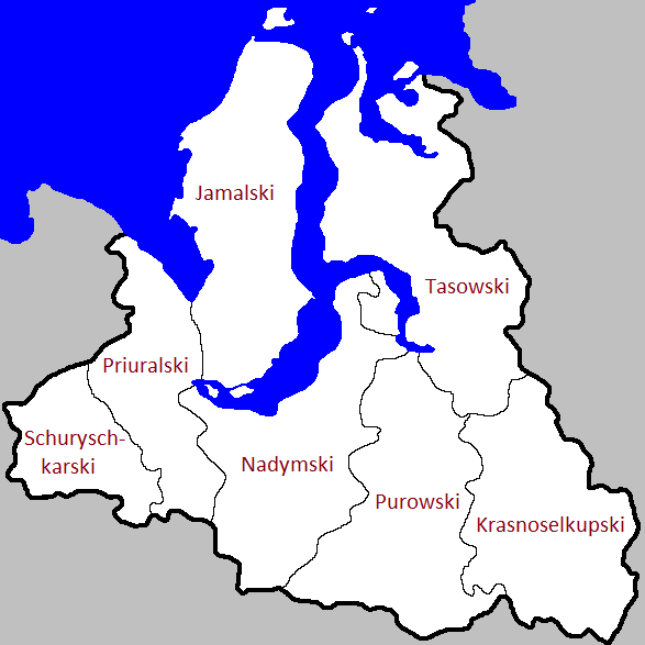 Позиционная карта Ямало-Ненецкого автономного округа